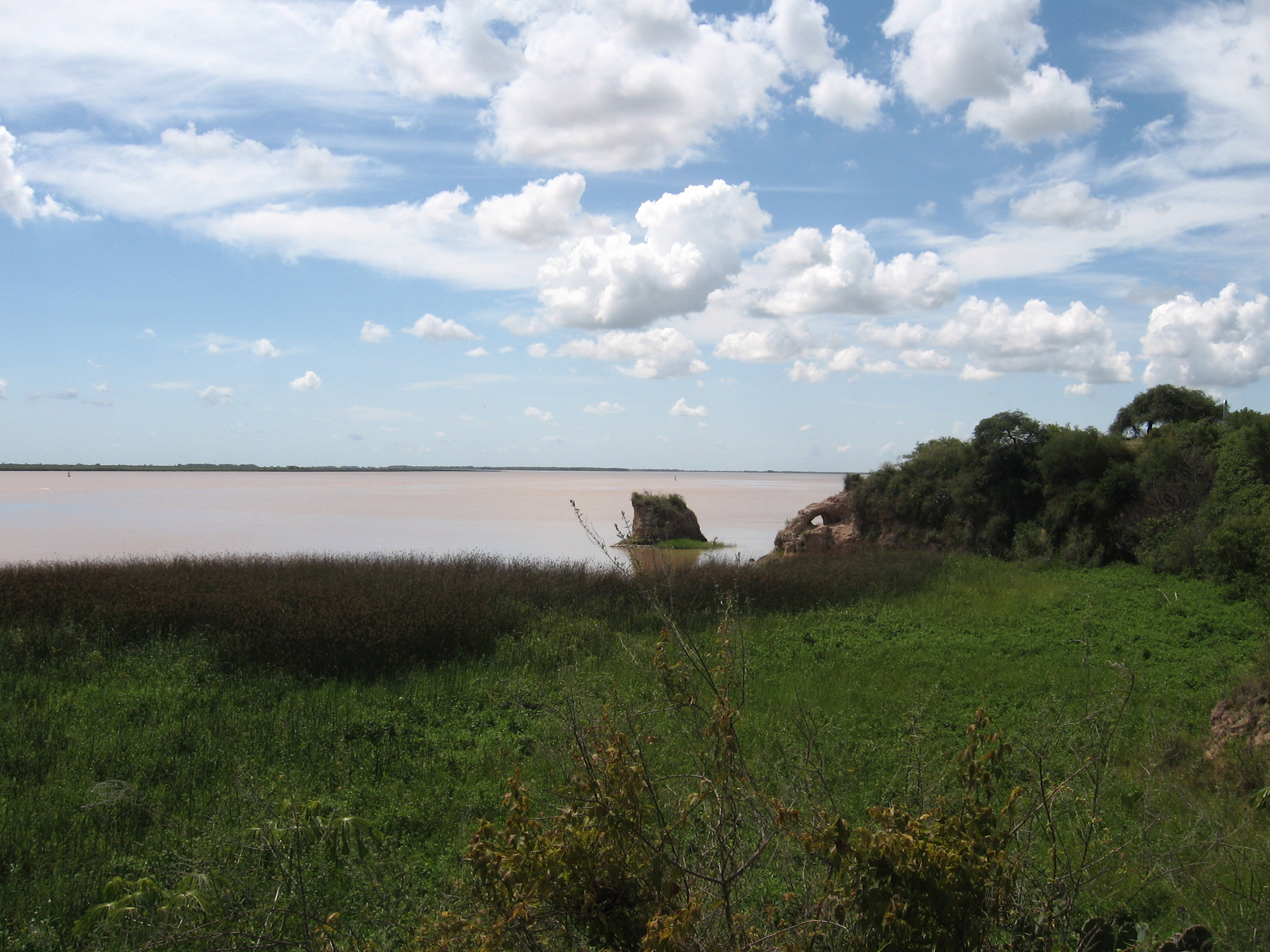 Rio Paraná, en el sitio en donde se celebró la Batalla de Vuelta de Obligado